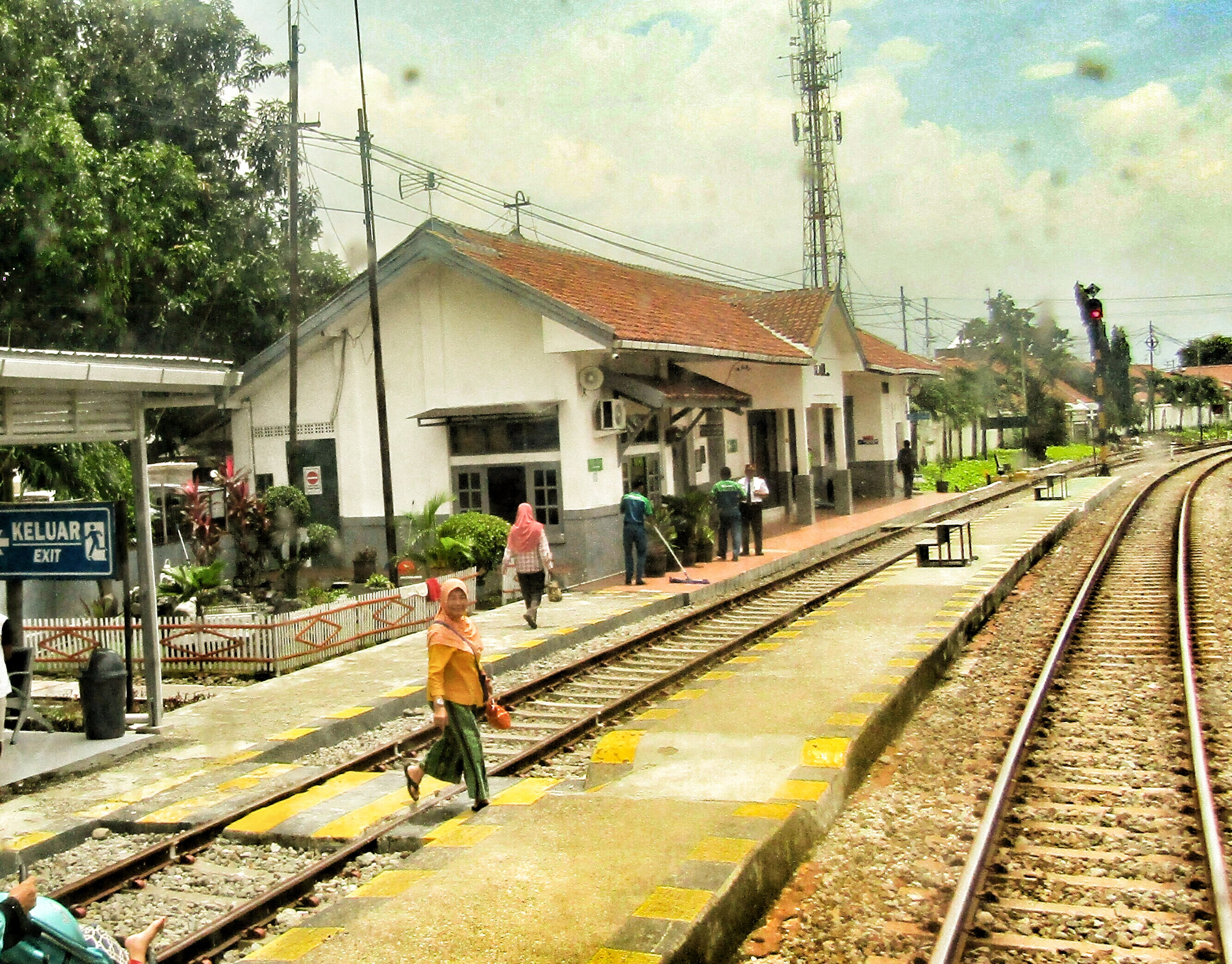 Tampak peron Stasiun Slawi, 2019